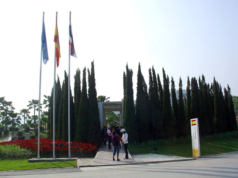 Imagen del acceso al pabellon-jardin de España en Royal Flora Ratchaphruek